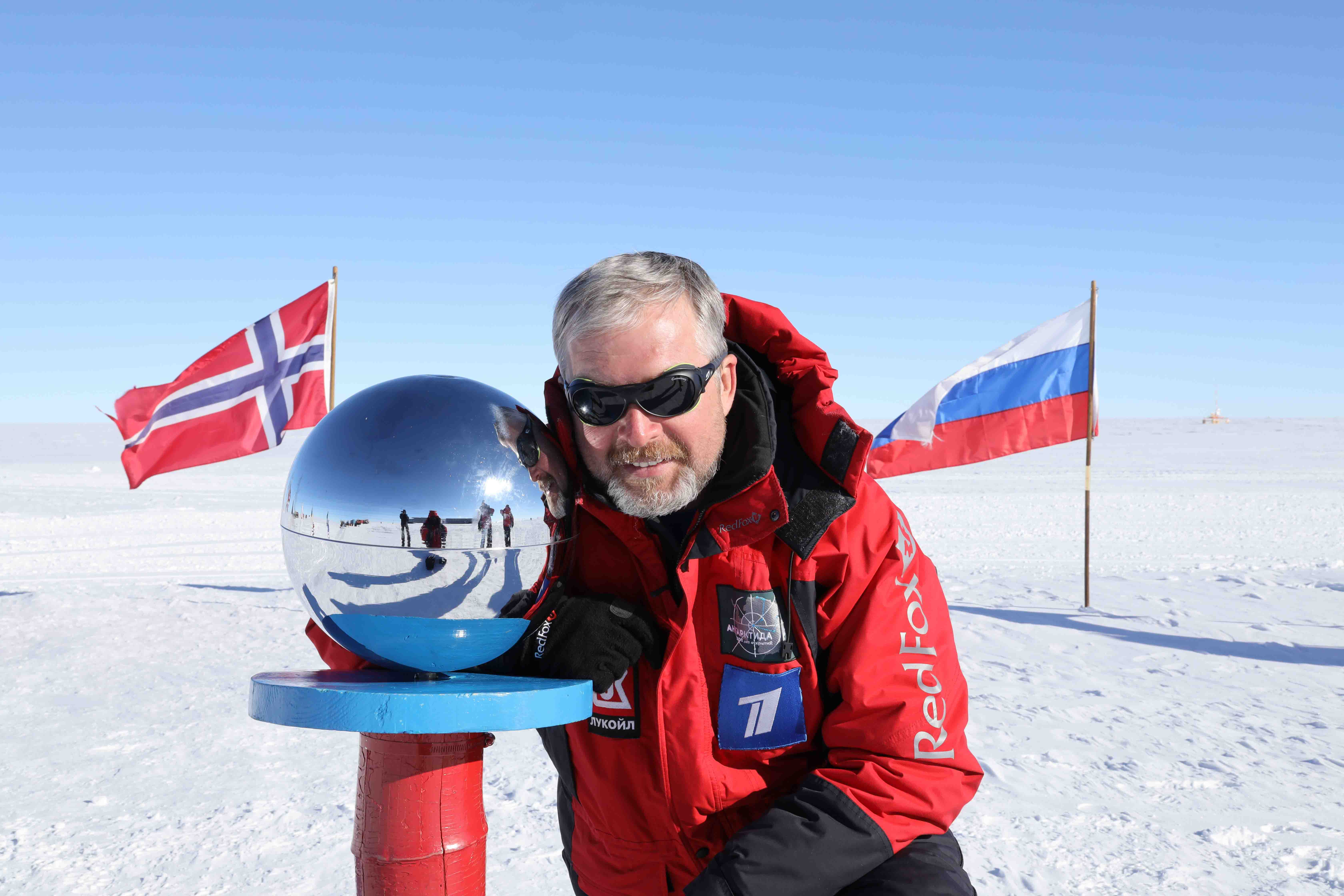 Первый трансантарктический автономный автомобильный переход